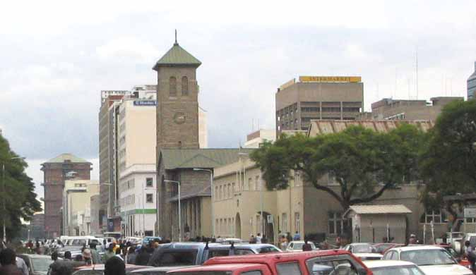 Зграда парламента Зимбабвеа у Харареу, у позадини се види торањ Англиканске катедрале. 24 март 2005, аутор Радован Корда